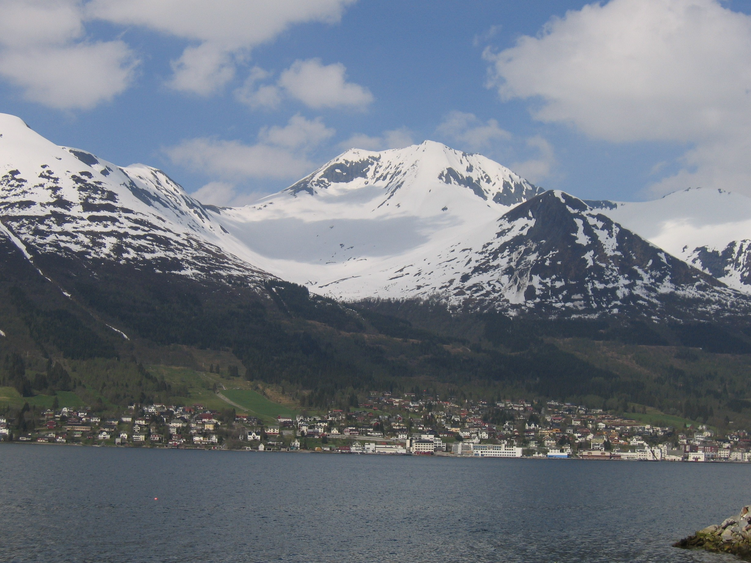 Saudehornet, seen from Ørstafjorden